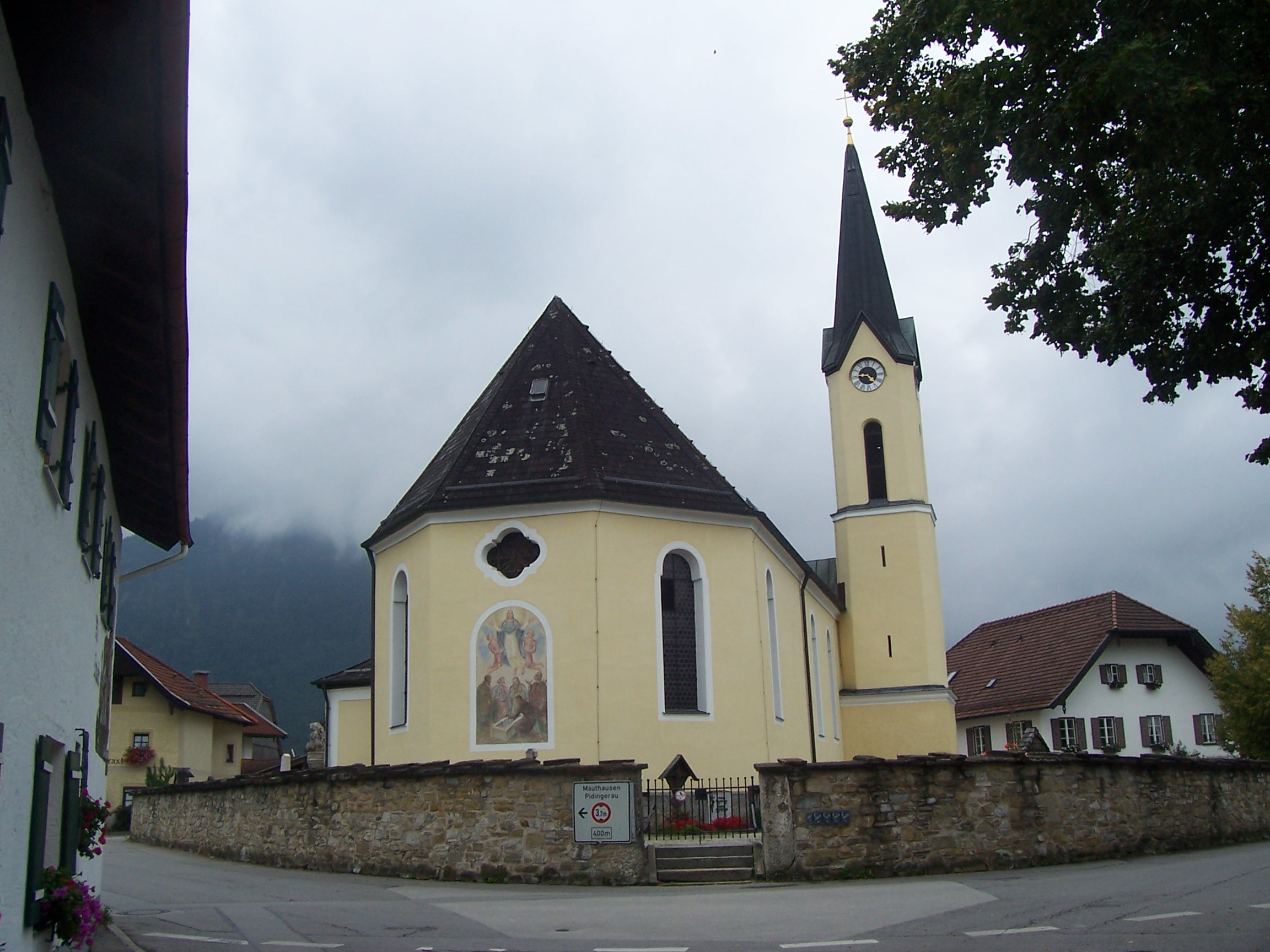 Pfarrkirche Mariä-Geburt in Piding Dorf Bei Verwendung bitte ich hier um einen Hinweis, wo das Foto genutzt wird.